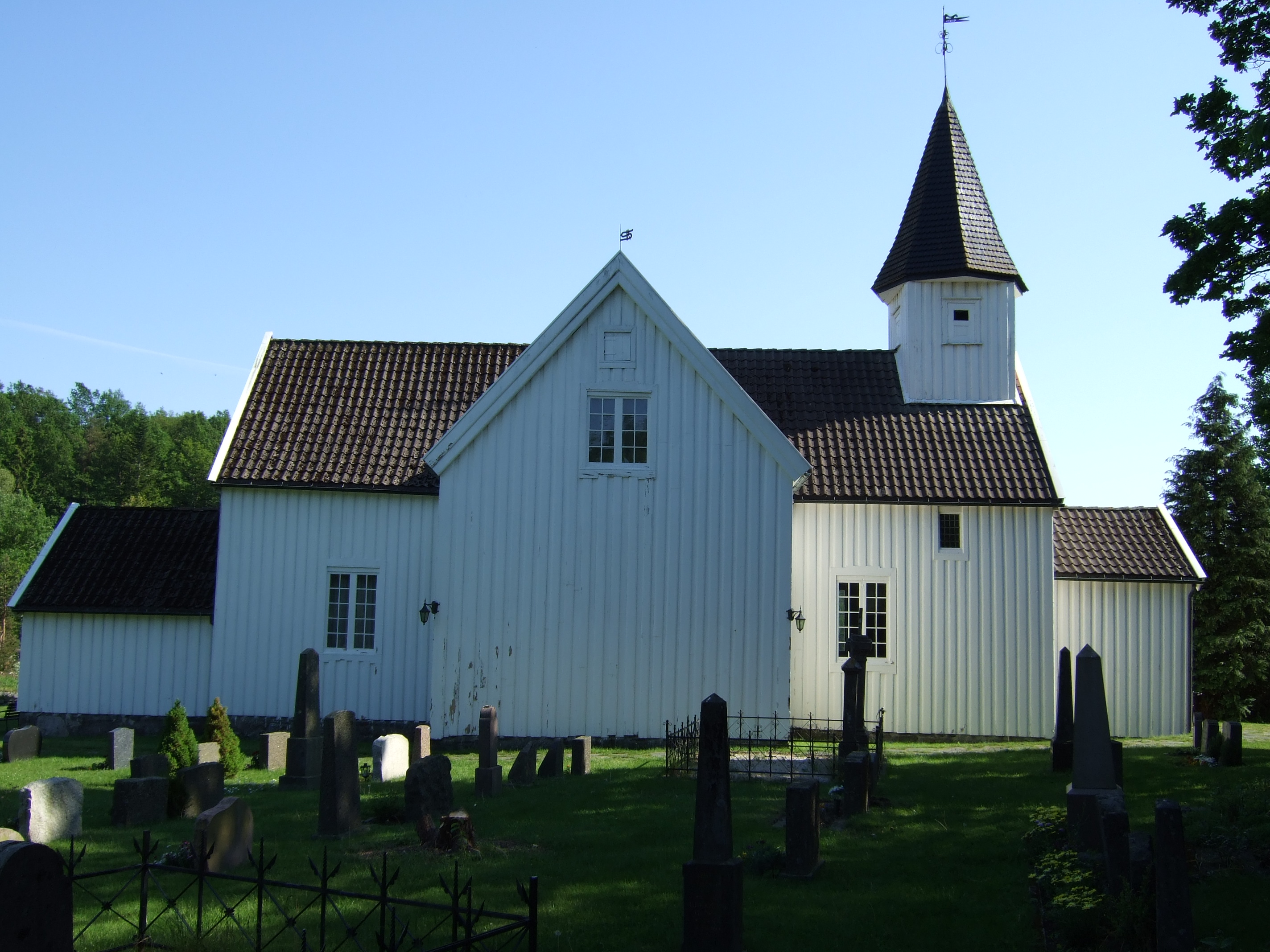 Eide church, Norway